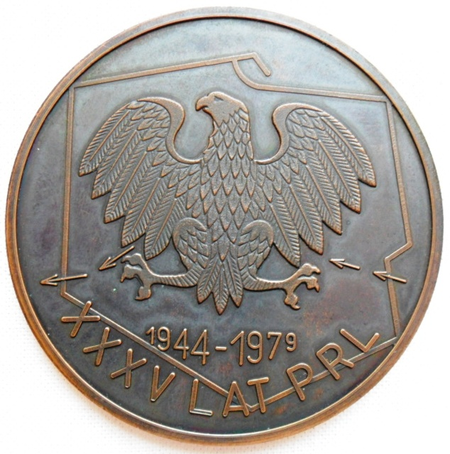 Medal pamiątkowy 5 SDPiech.